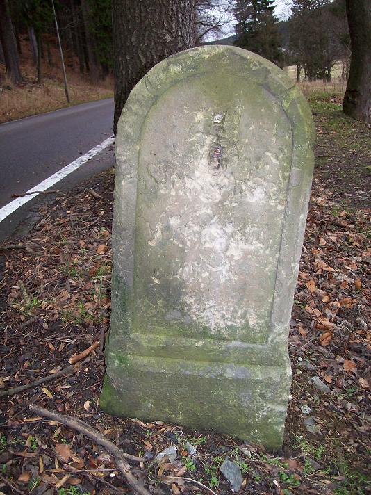 KSM Halbmeilenstein Holzhau, Muldentalstr. (ehem. Hermsdorf/Erzg.)